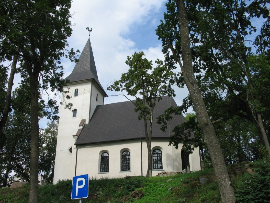 Priekules luterāņu baznīca